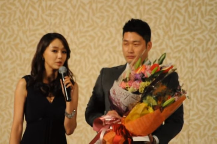 2013년 12월 3일 조아제약 프로야구 대상에서 구원투수상을 받은 오승환.